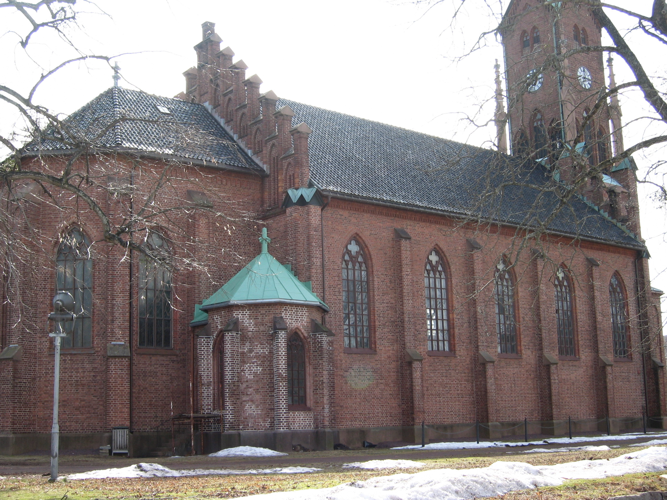 Horten Kirke/Church of Horten, Norway side view